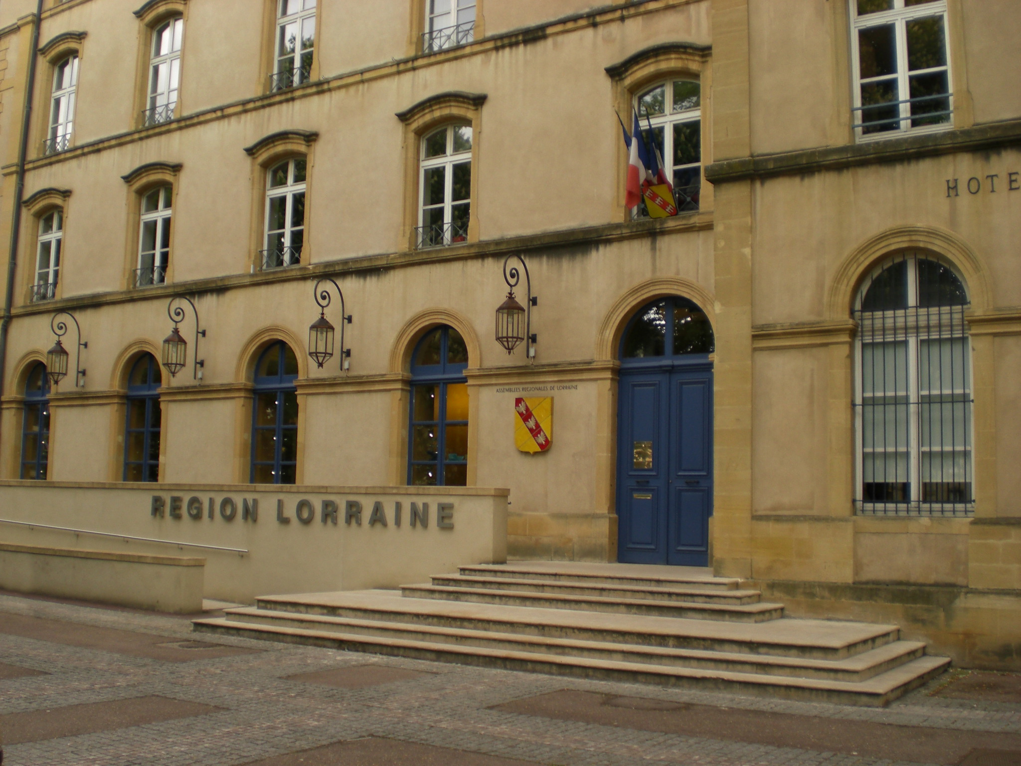 Region Lorraine, Siège des Assemblées regionales à Metz